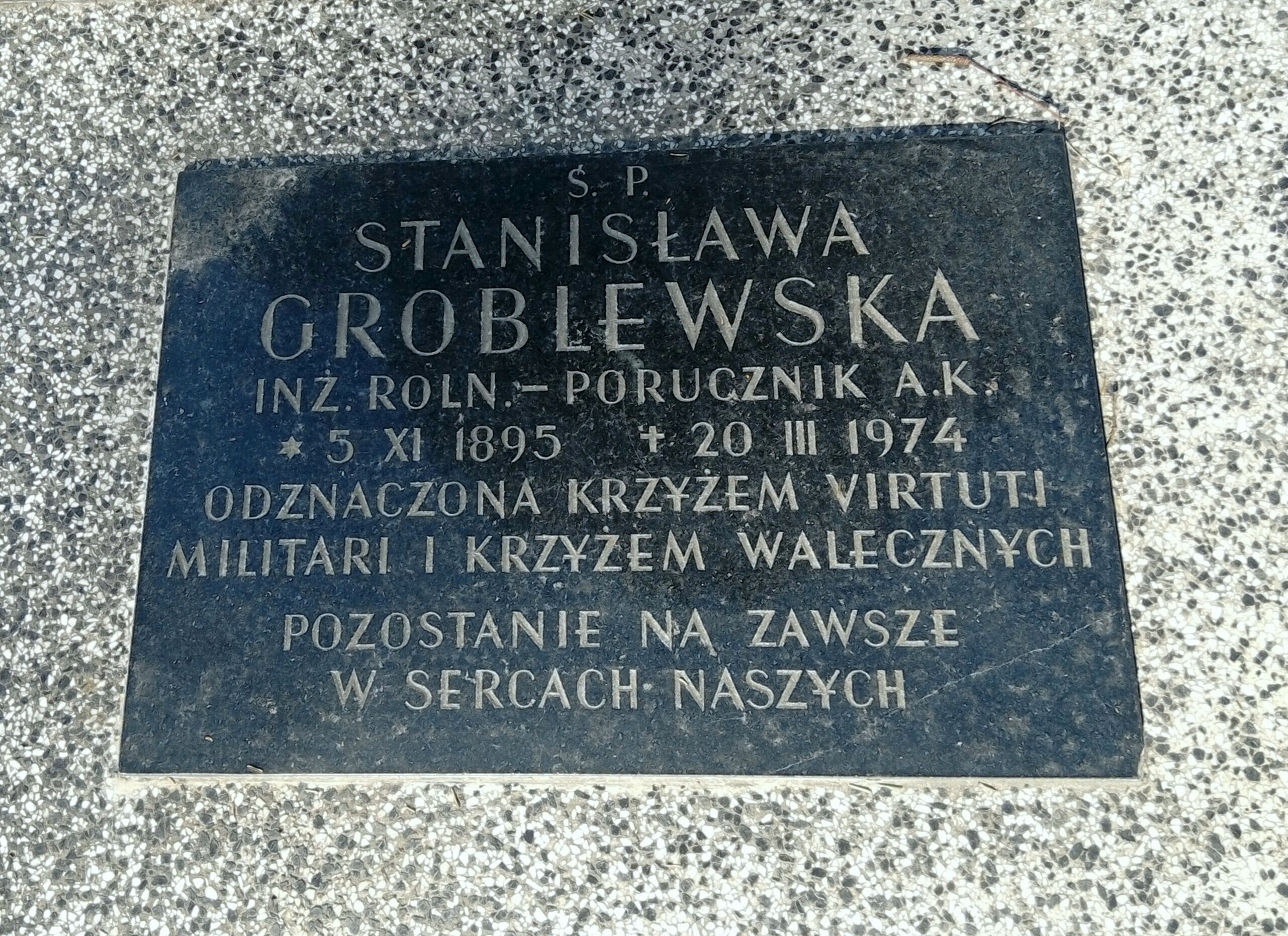 Nagrobek Stanisławy Groblewskiej, Kraków